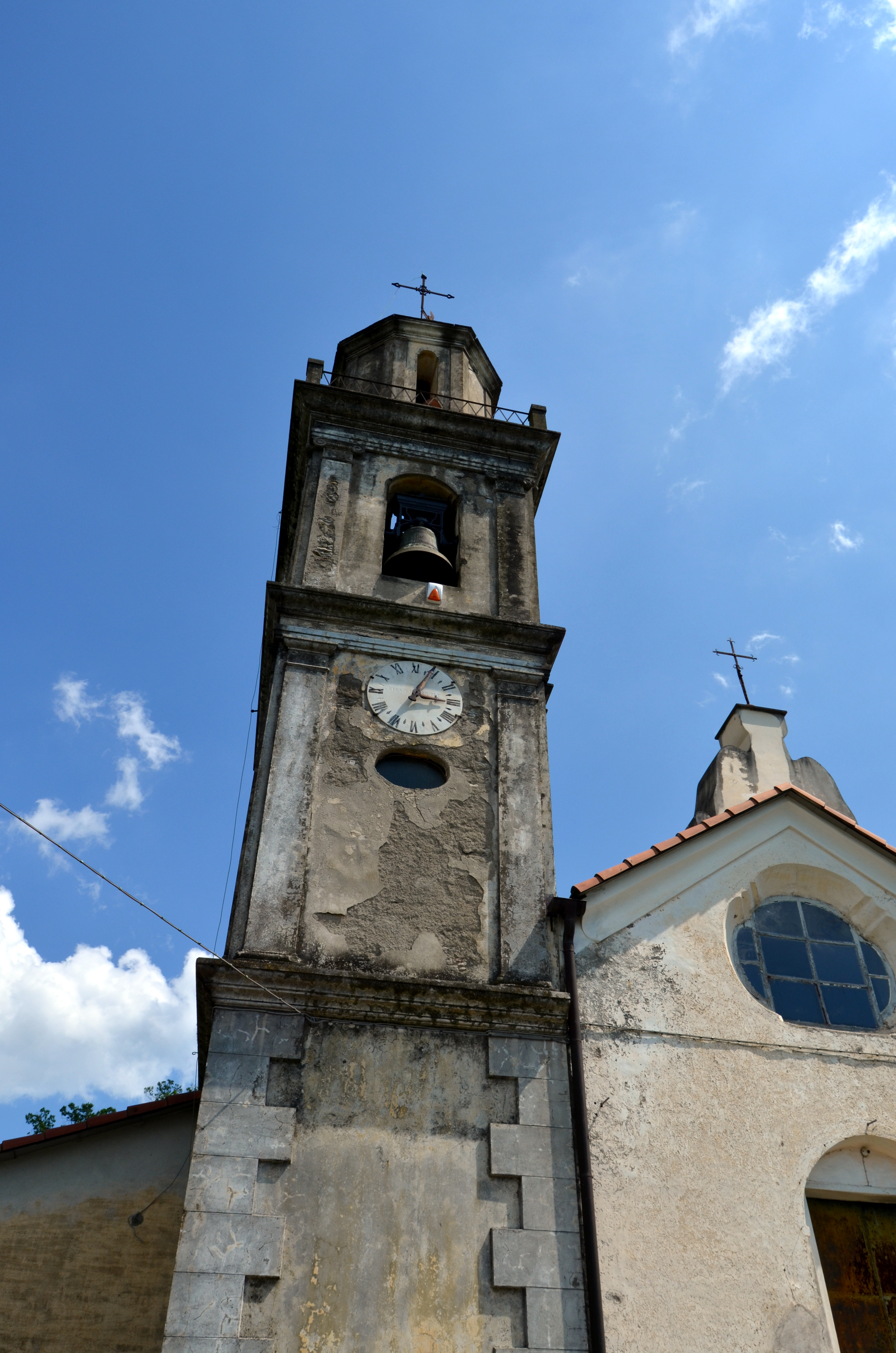 Chiesa di San Cipriano di Sambuceto, Ne, Liguria, Italia